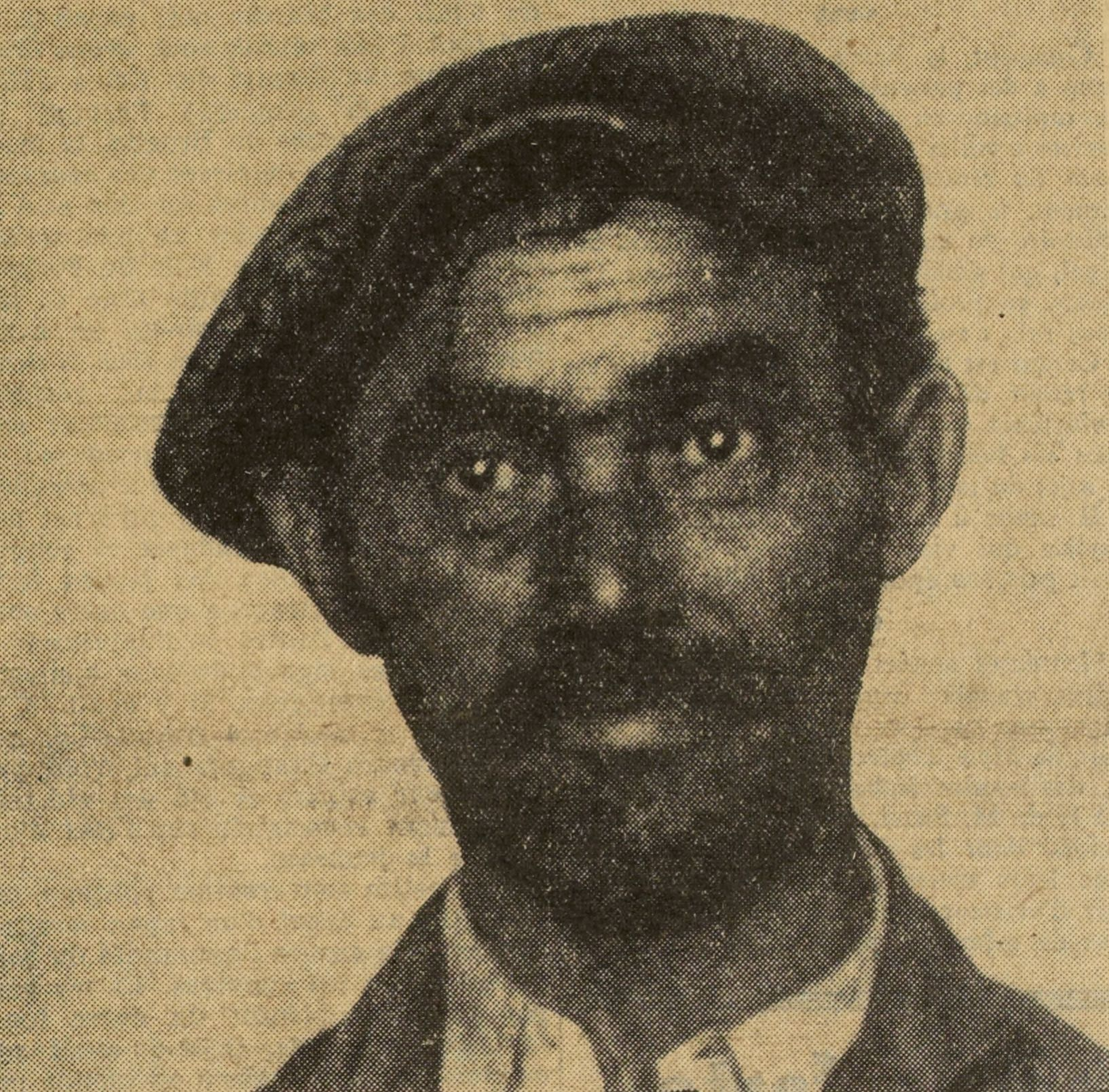 Portrait du tueur en série Giuseppe Sasia